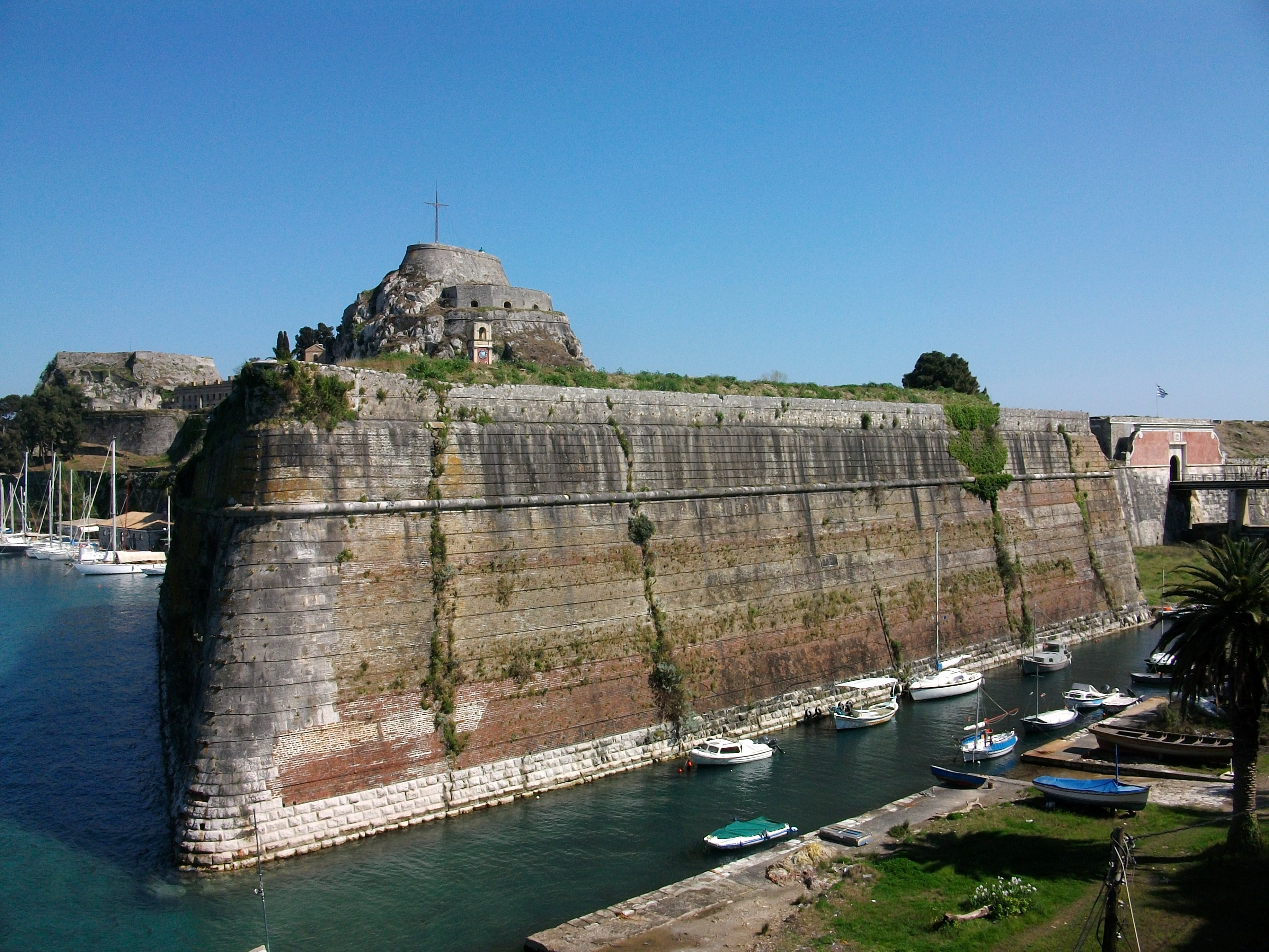 Baluard de la fortalesa vella de Corfú.